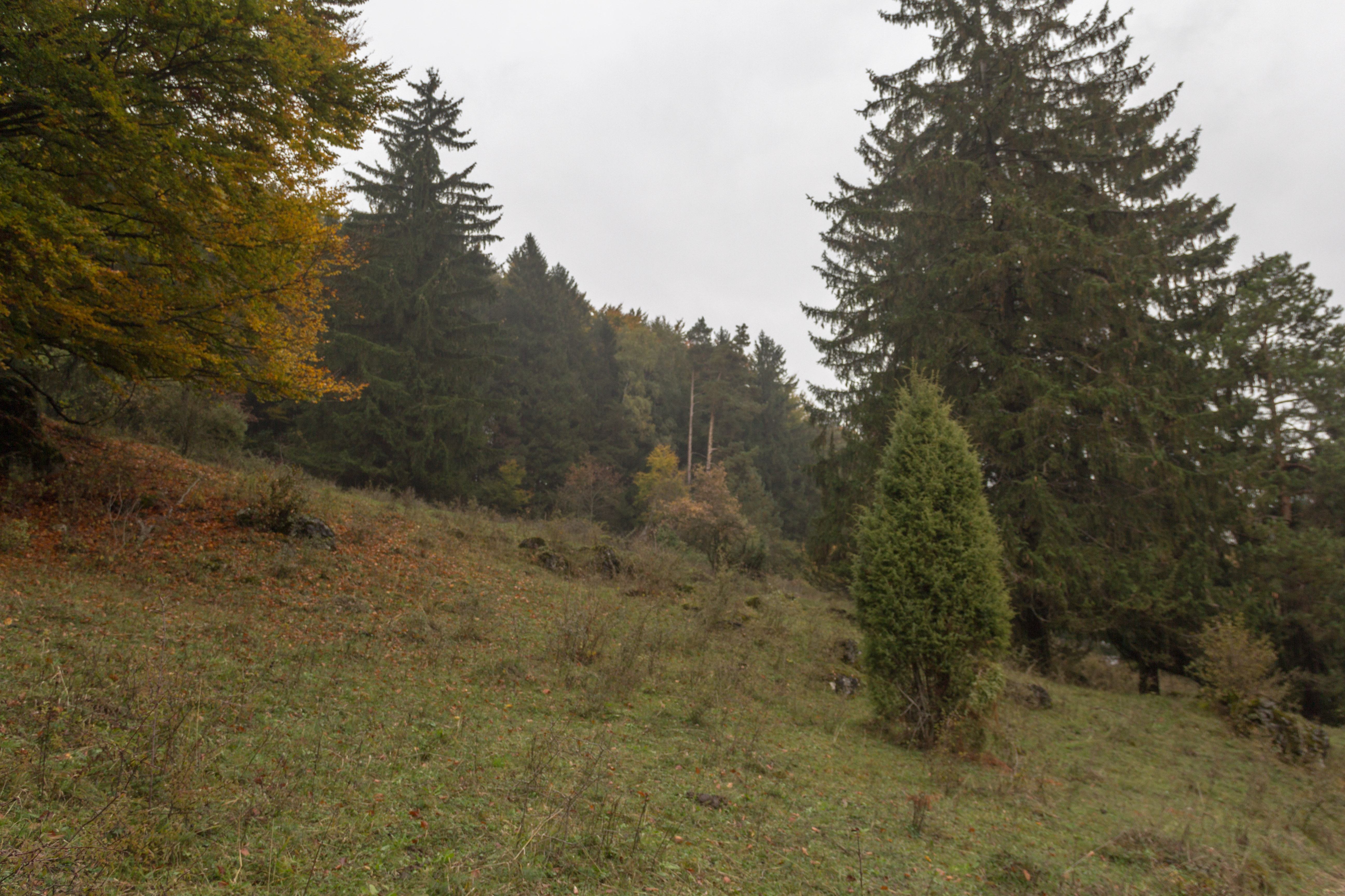 Heuchlinger Hutanger, Pommelsbrunn